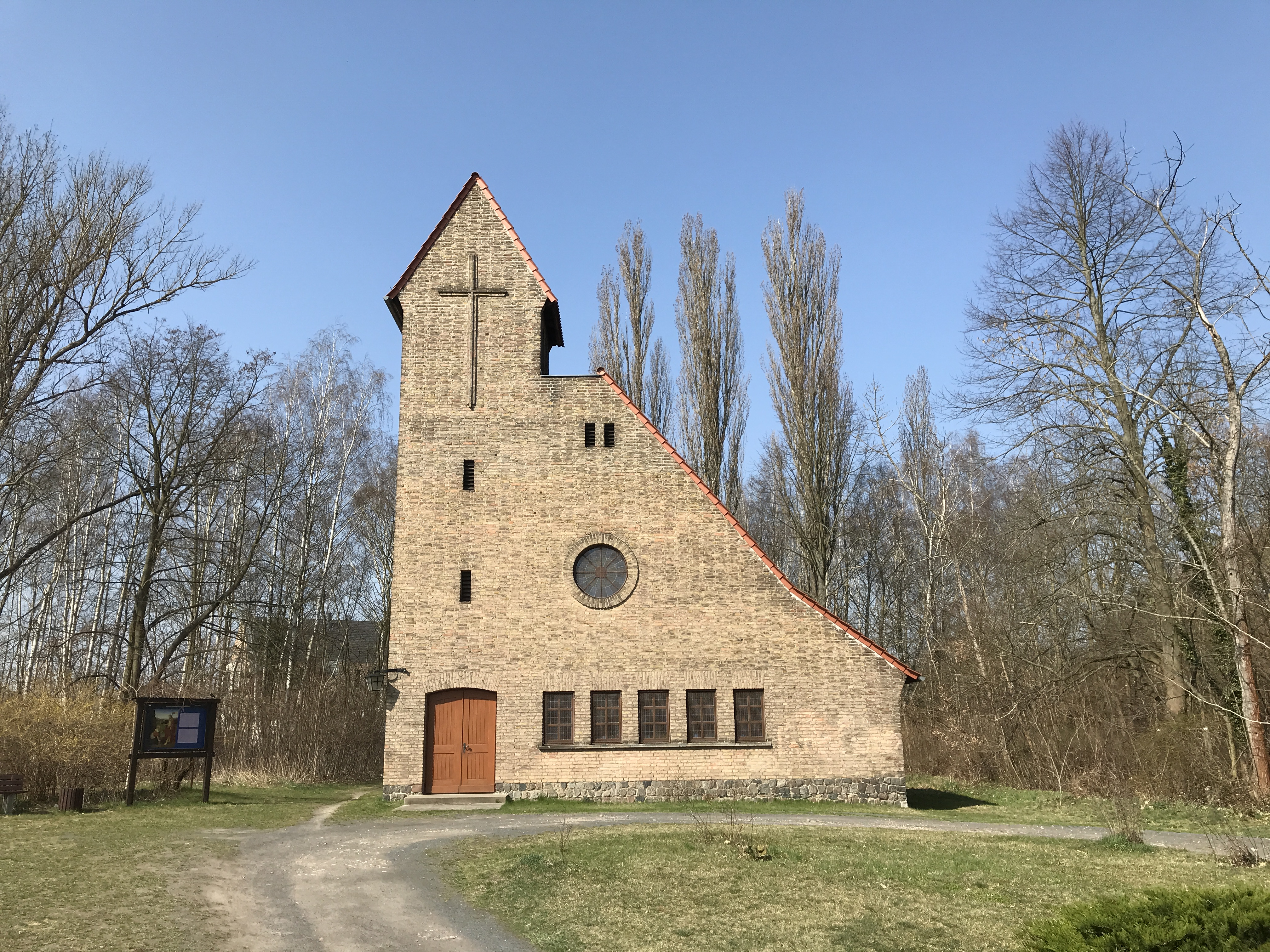 Die Kreuzkirche Schulzendorf entstand in den Jahren 1951 und 1952 unter der Leitung von Jakob Wassum in Schulzendorf, Landkreis Dahme-Spreewald.